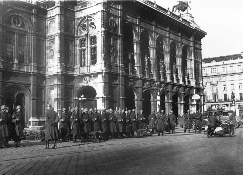 Aufstand der republikanischen Schutzbündler in Österreich Februar 1934. Soldaten des Bundesheeres vor der Oper in Wien.